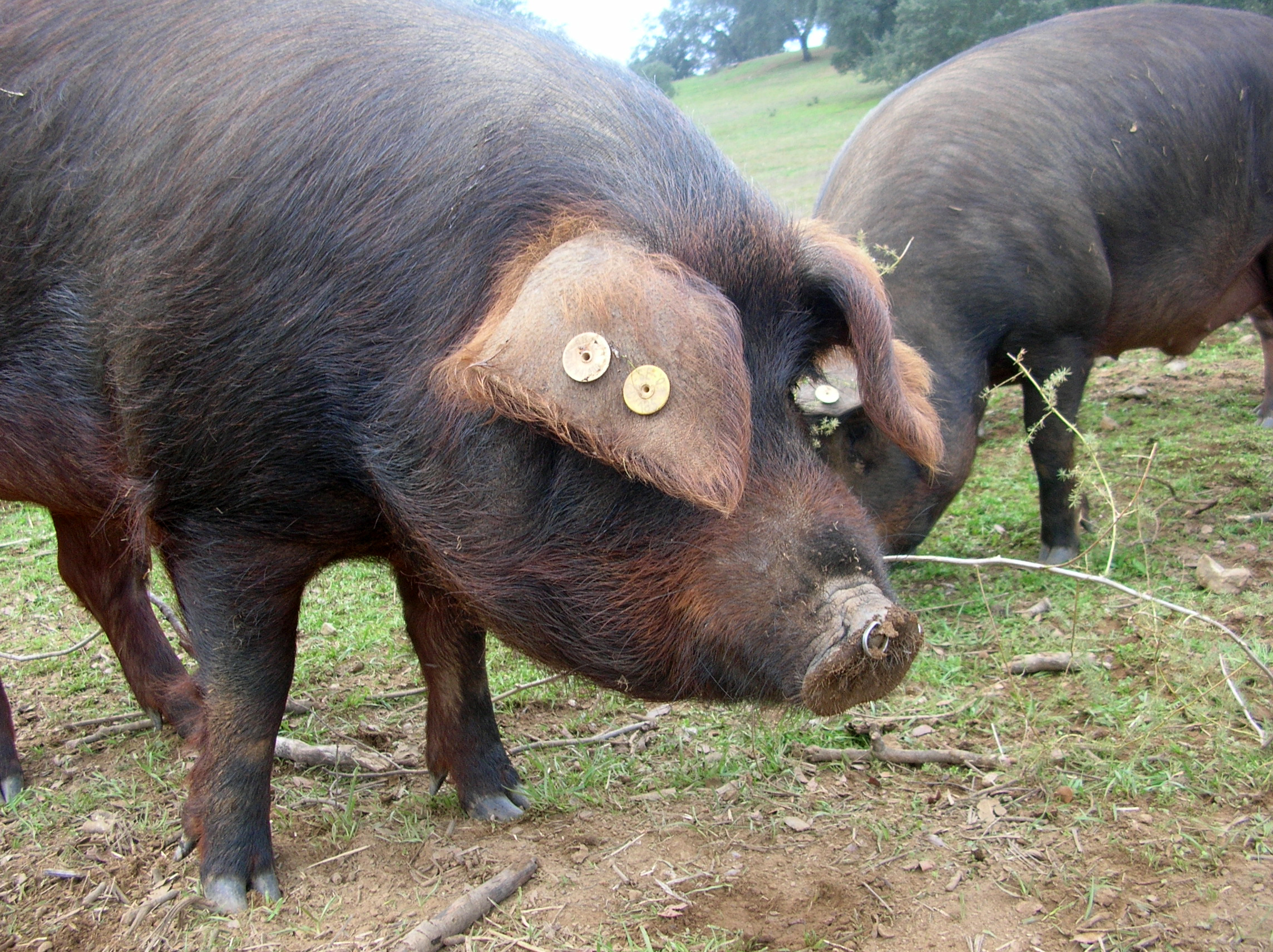 Porcs ibériques (cerdo ibérico) dans la sierra nord de Séville (Espagne)